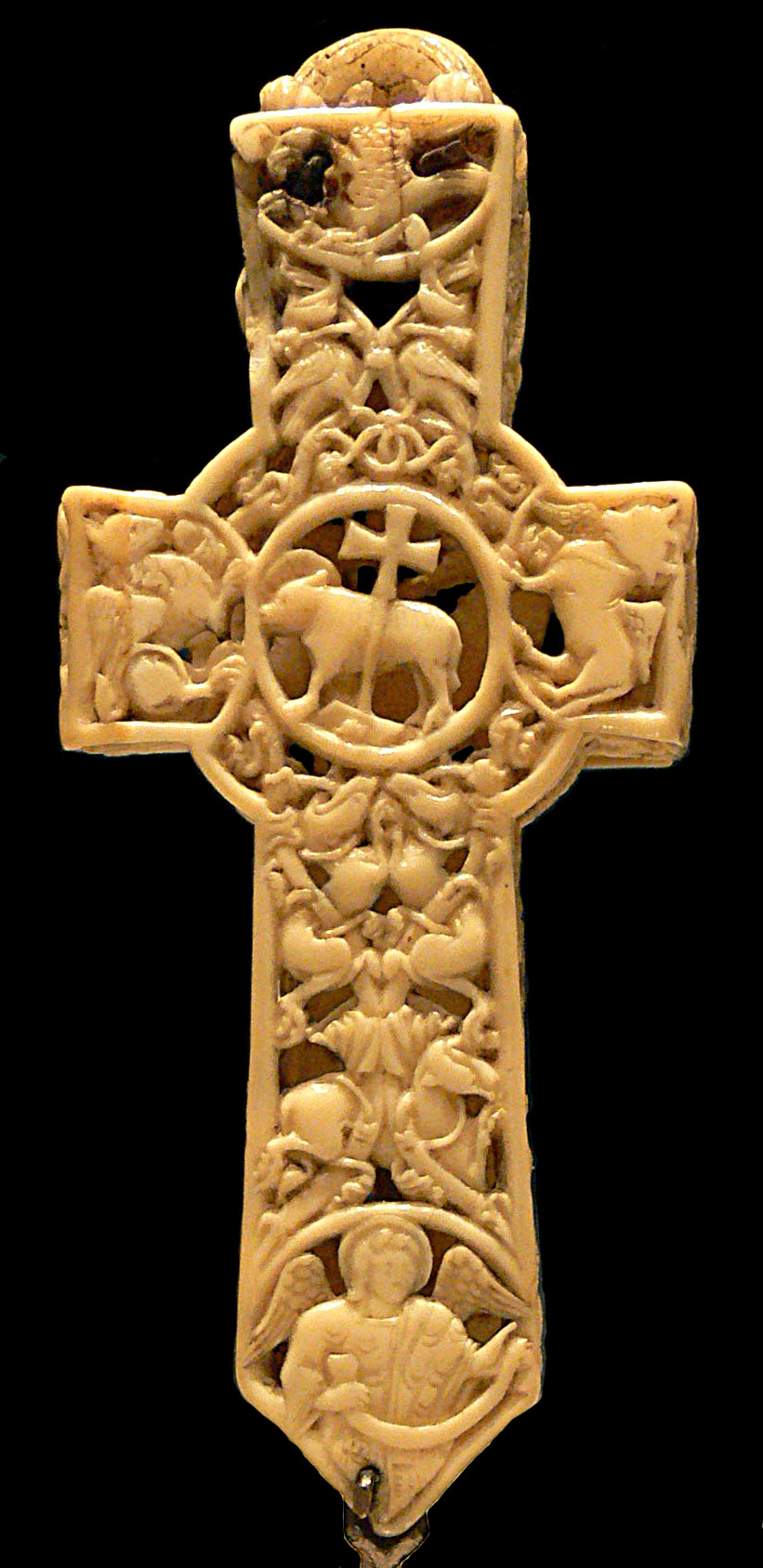 Croix reliquaire (Grande Bretagne, daté des environs de la moitié du XIème siècle) en ivoire de morse. Victoria & Albert Museum, London Photographié lors de l'Exposition : Celtes et Scandinaves, rencontres artistiques, VIIe-XIIe siècle, 1er octobre 2008 - 12 janvier 2009, Musée national du moyen-âge - thermes et hôtel de Cluny (photographie autorisée dans le musée et l'exposition, avec une restriction : sans flash). Anglo-Saxon ivory reliquary cross, V&A Museum, London